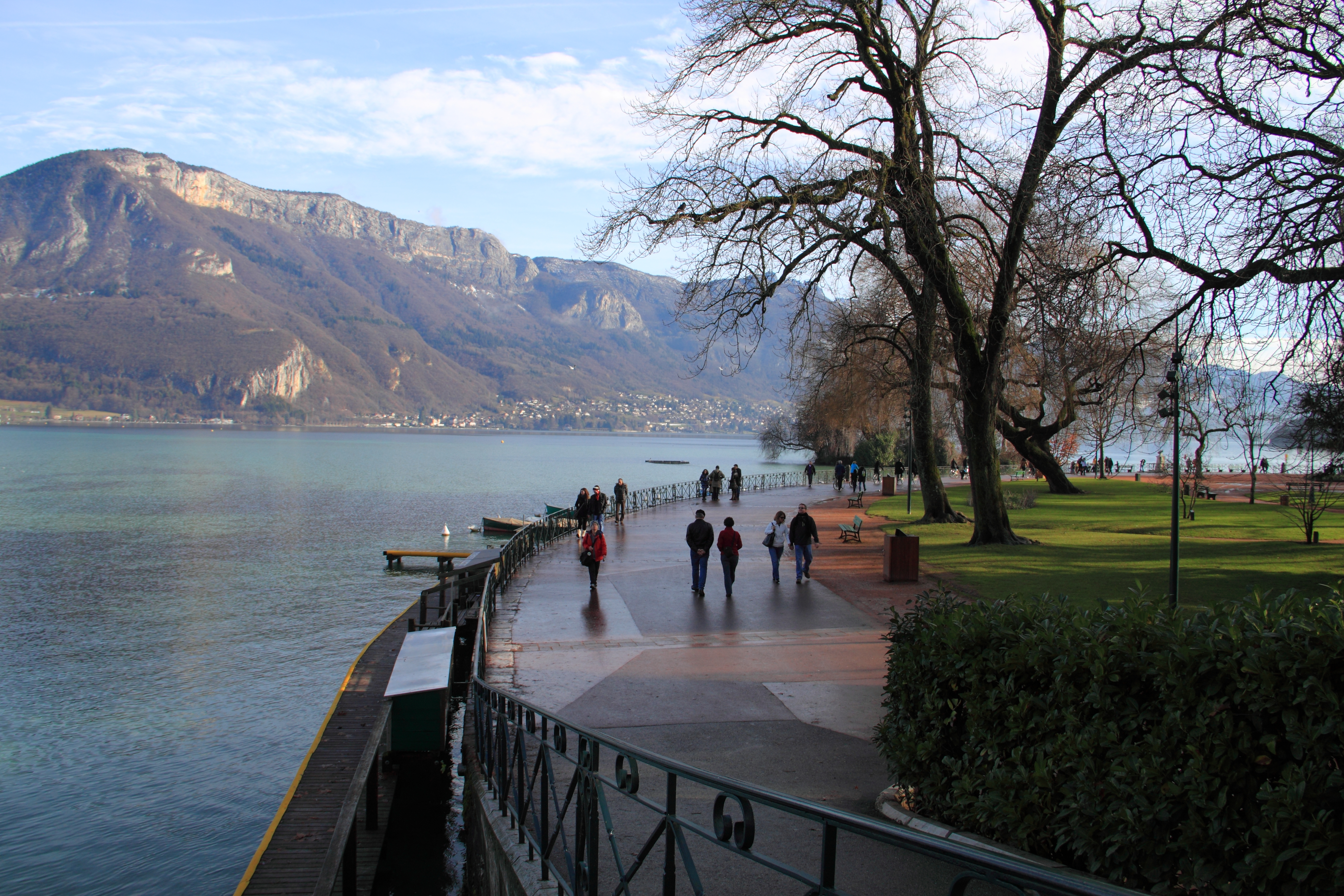 Lac Annecy